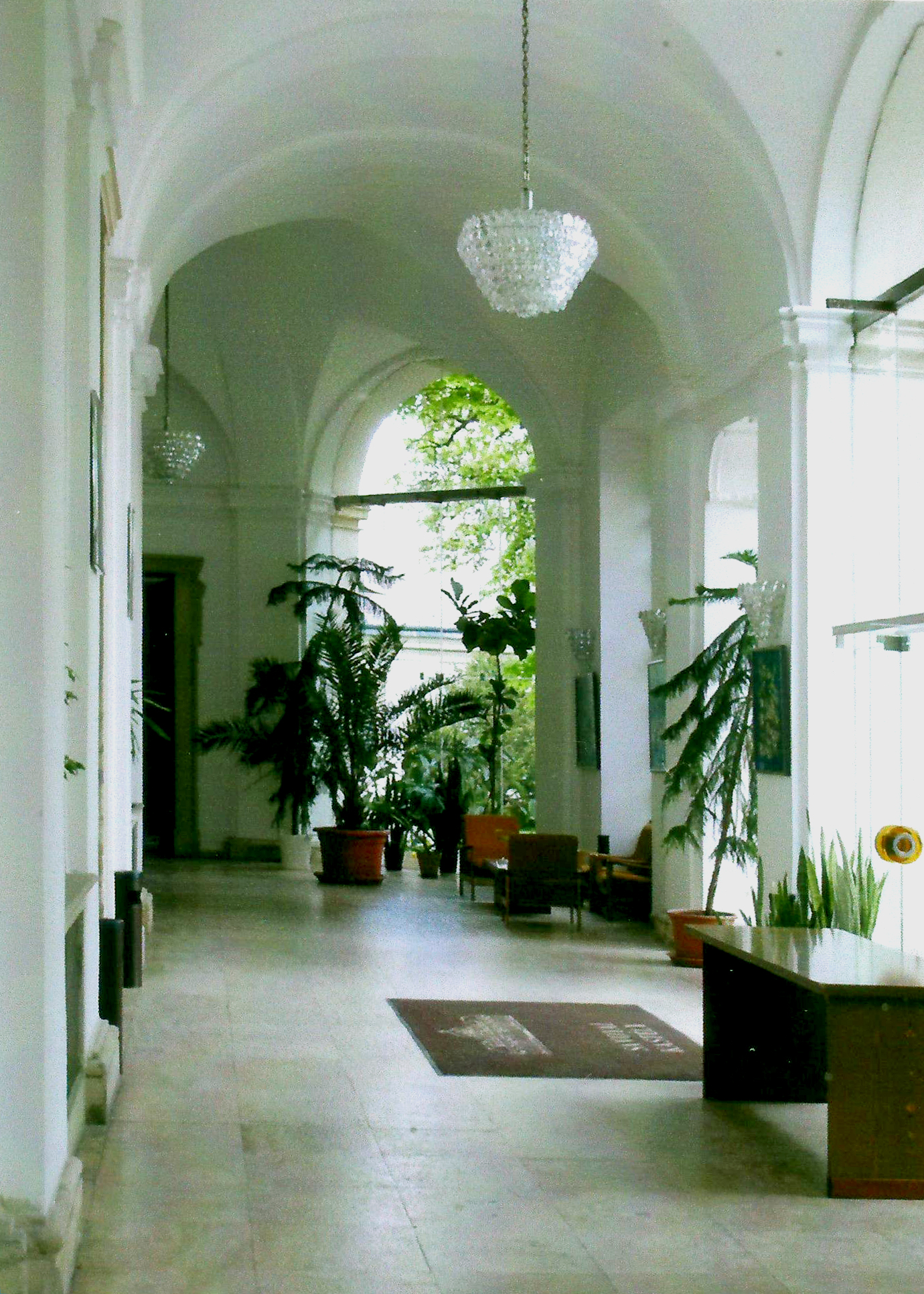 A ráckevei kastély belső tere